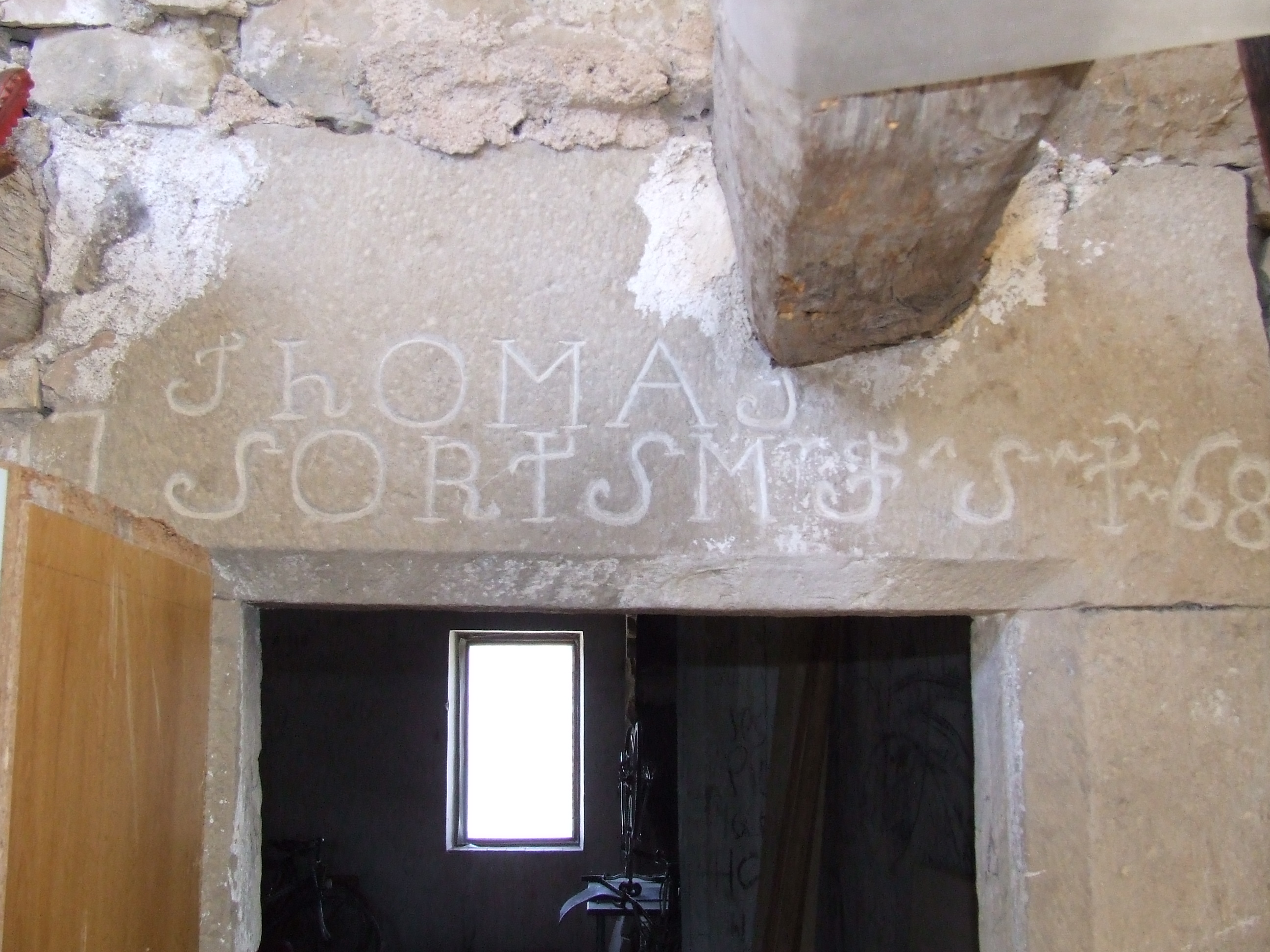 Llinda de la masia dels Sorts (Marfà, Castellcir, Moianès)